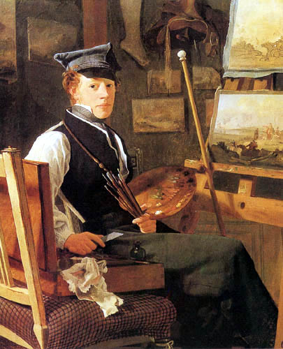 Jens Christian Frederik Carl Holm (Det Nationalhistoriske Museum ved Frederiksborg Slot)